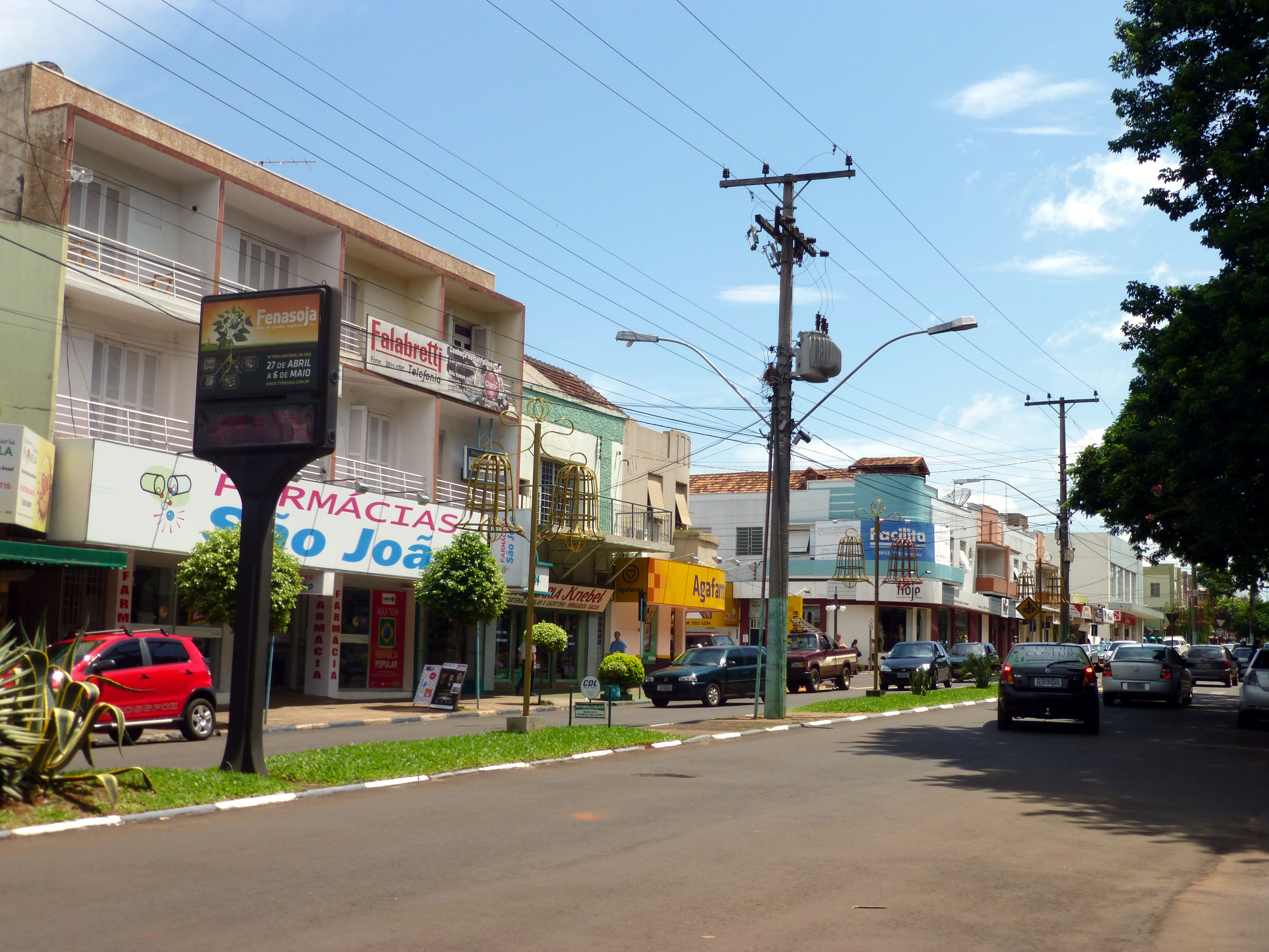 La Avenida Rio Branco, una de las principales arterias de la ciudad de Santa Rosa, en Rio Grande do Sul, Brasil.